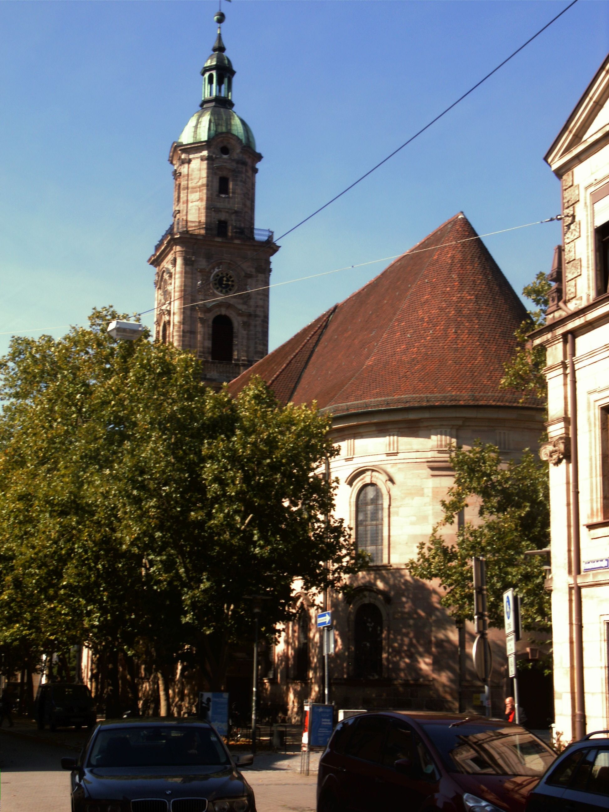 Neustädter Kirche von Osten aus aufgenommen.